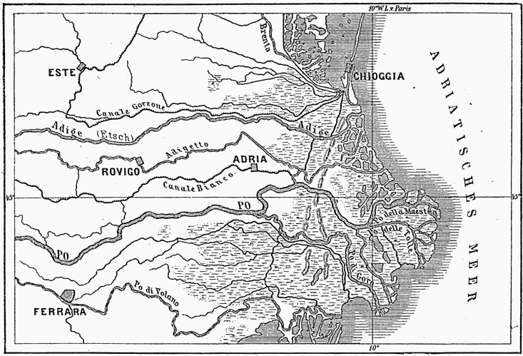 Delta des Po